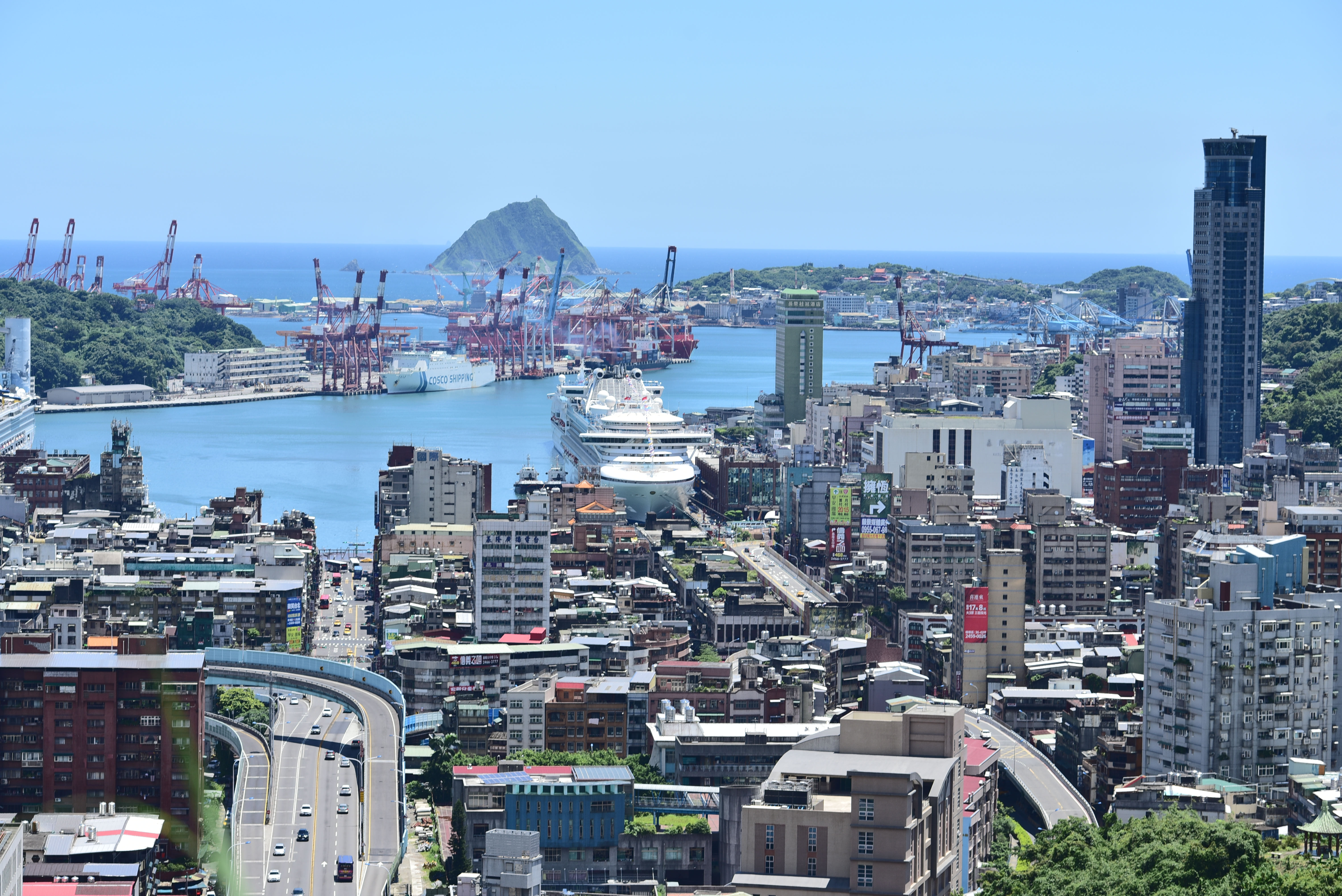 中文（台灣）: 獅球嶺眺望基隆港2017